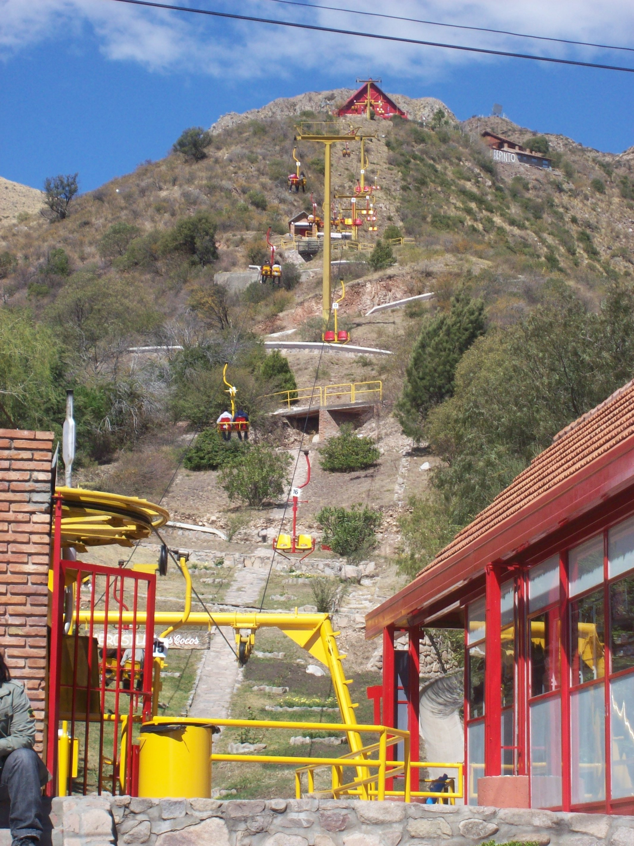 Aerosilla de Los Cocos en esta localidad de la Provincia de Córdoba, Argentina.